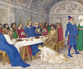 Deposition. Heures d'Étienne Chevalier, enluminées par Jean Fouquet